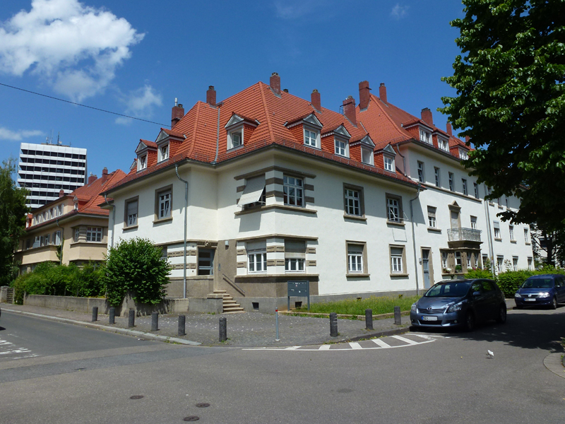 Siedlung am Fichteplatz, Straßenkreuzung im Siedlungsviertel